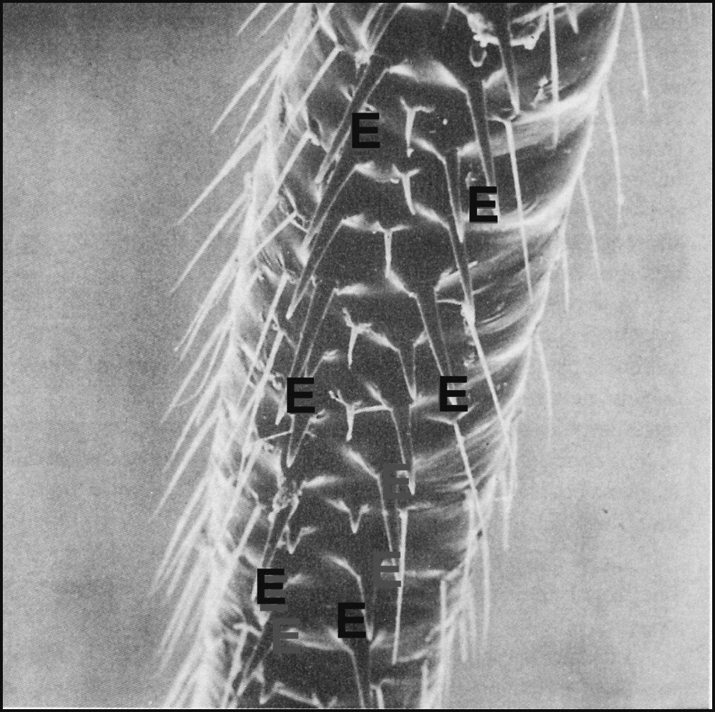 Les deux rangées d'épines sur le deuxième fémur d' Arachnocoris karukerae vues au microscope électronique à balayage.